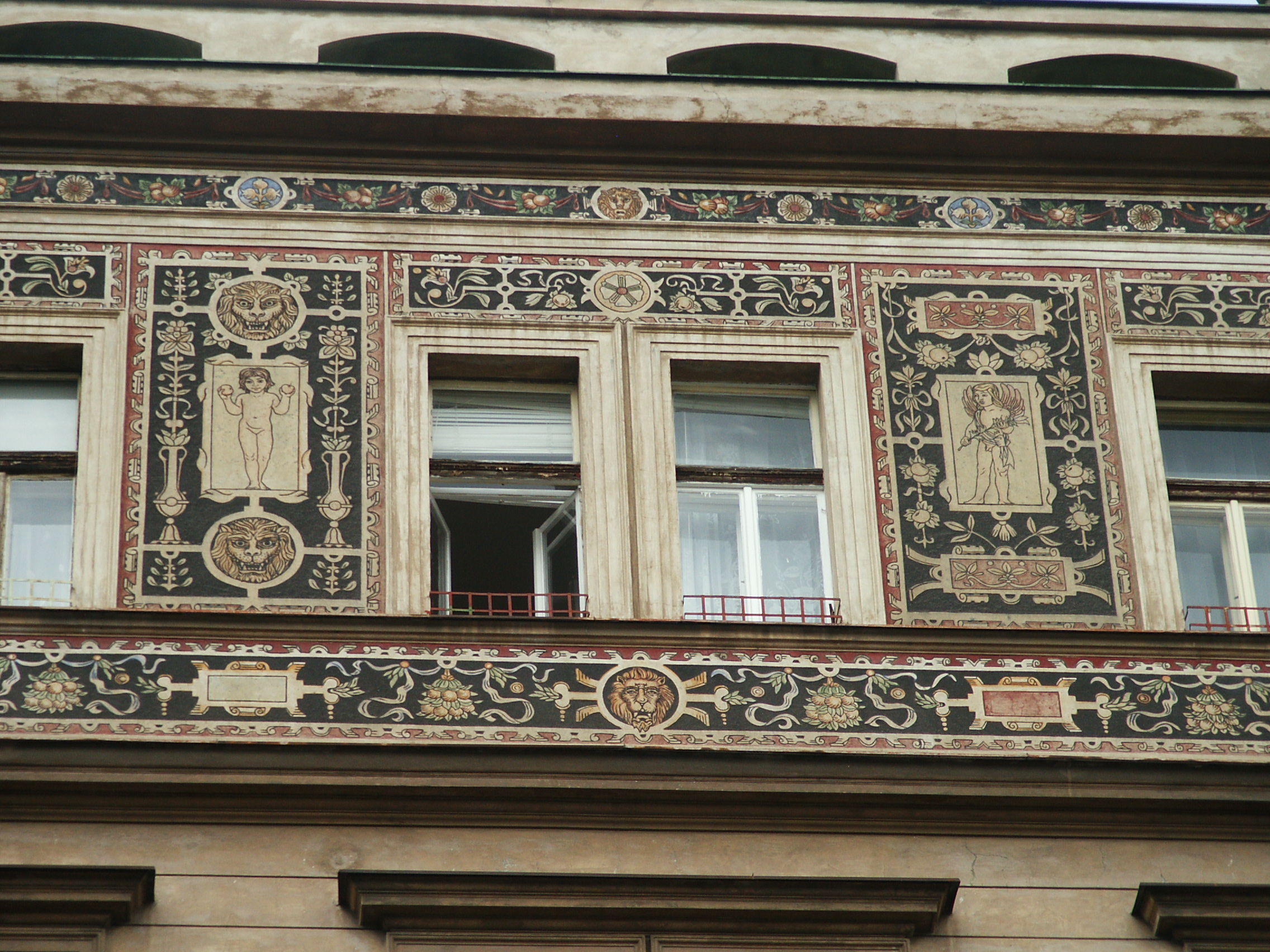 Dům Argentinská 1, Praha 7-Holešovice, Argentinská 702/1, Bubenské nábřeží 702/12 - sgrafito, poslední patro